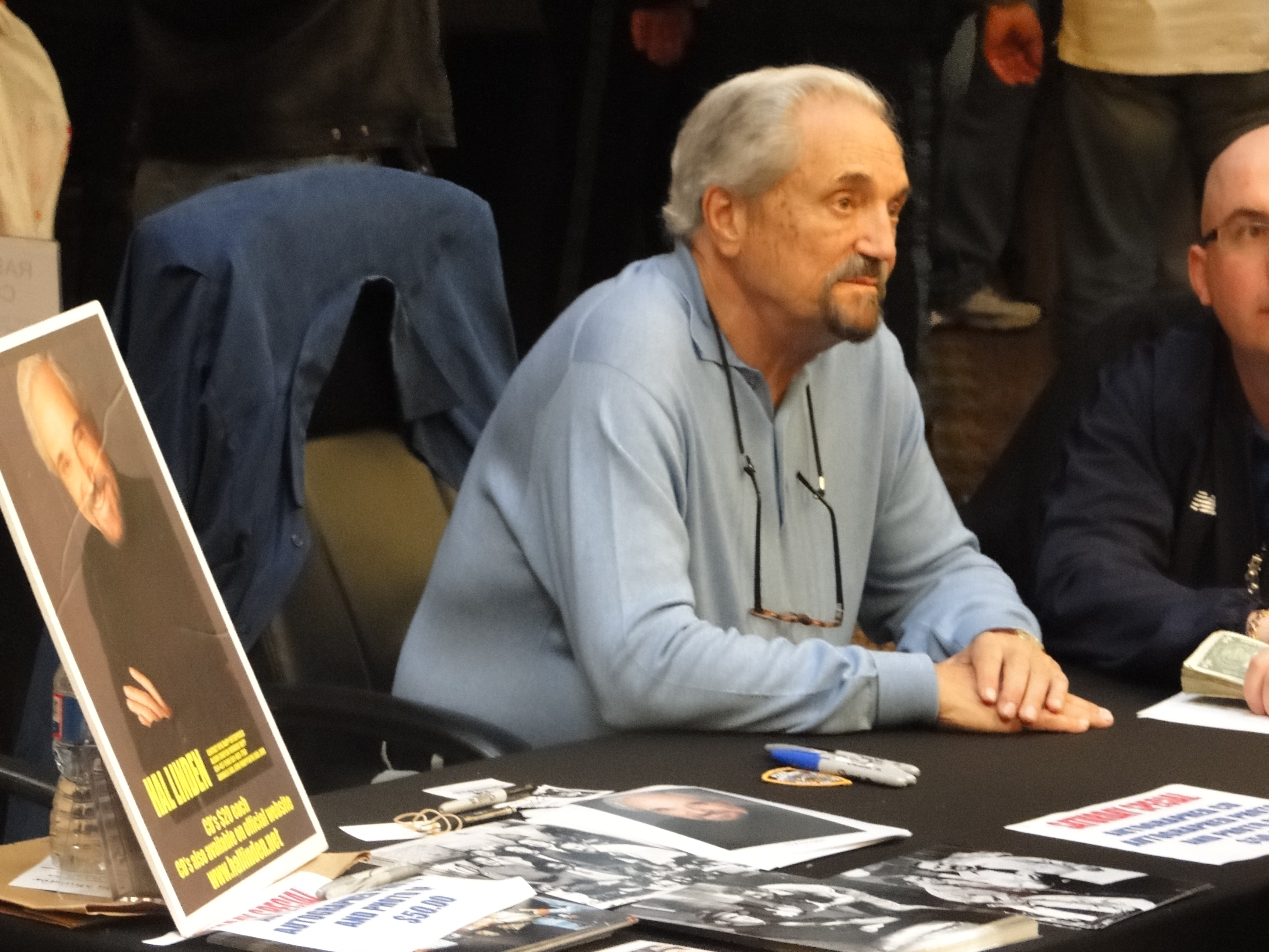 Hal Linden